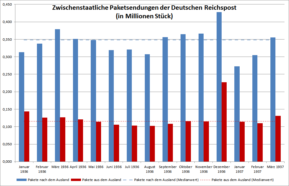 Datenquelle: »Zahlenspiegel der Deutschen Reichspost (1871 bis 1945)« Herausgegeben vom Bundesministerium für das Post- und Fernmeldewesen; bearbeitet von Oberpostrat a.D. Richard Maetz; Zweite, erweiterte und vervollständigte Auflage 1957. Gedruckt in der Bundesdruckerei; S. 34–44